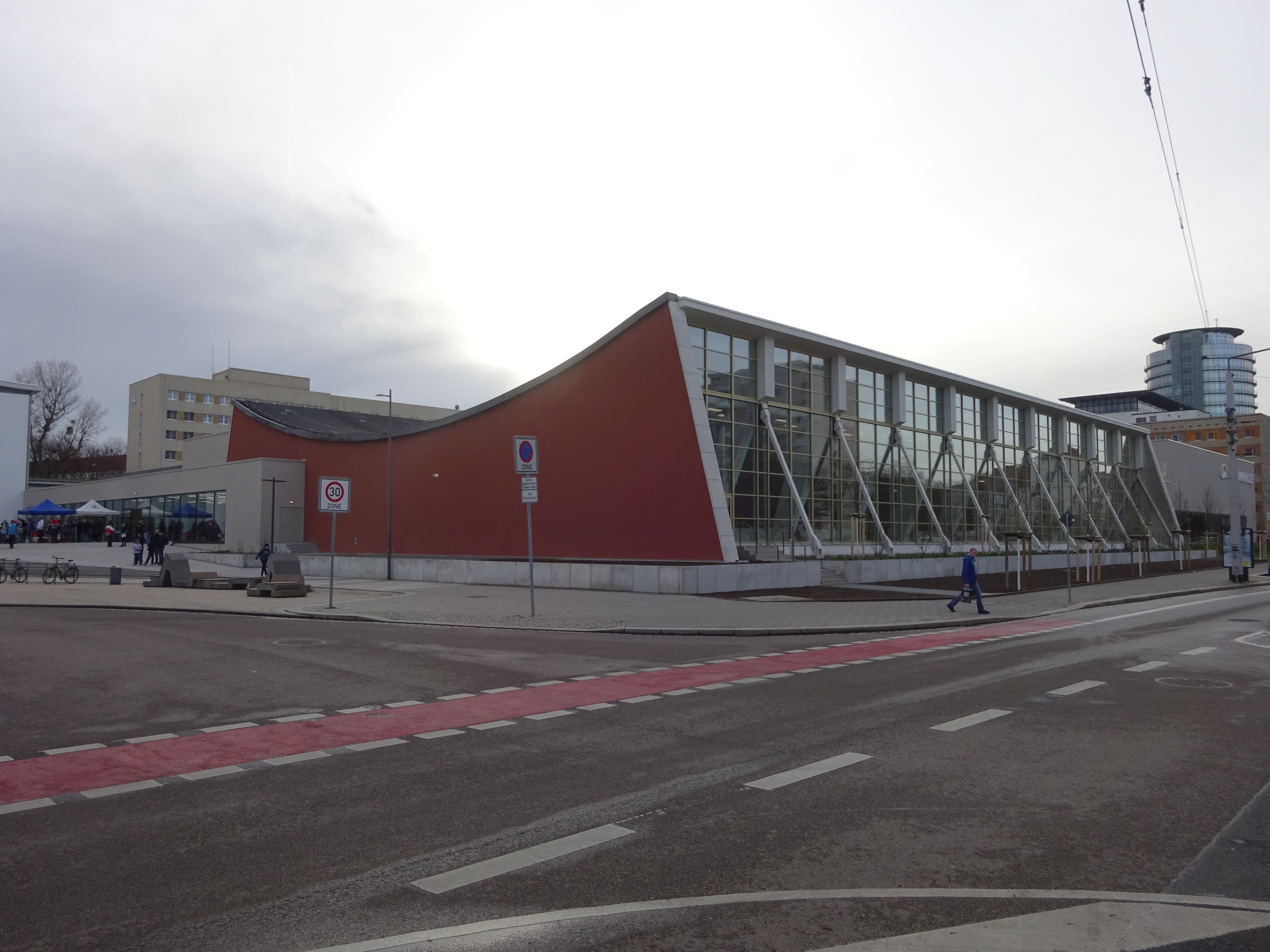 Ansicht des frisch sanierten Schwimmsportkomplexes am Freiberger Platz in Dresden, Ansicht vom Kreuzungsbereich und der Bahnhaltestelle; Dezember 2019